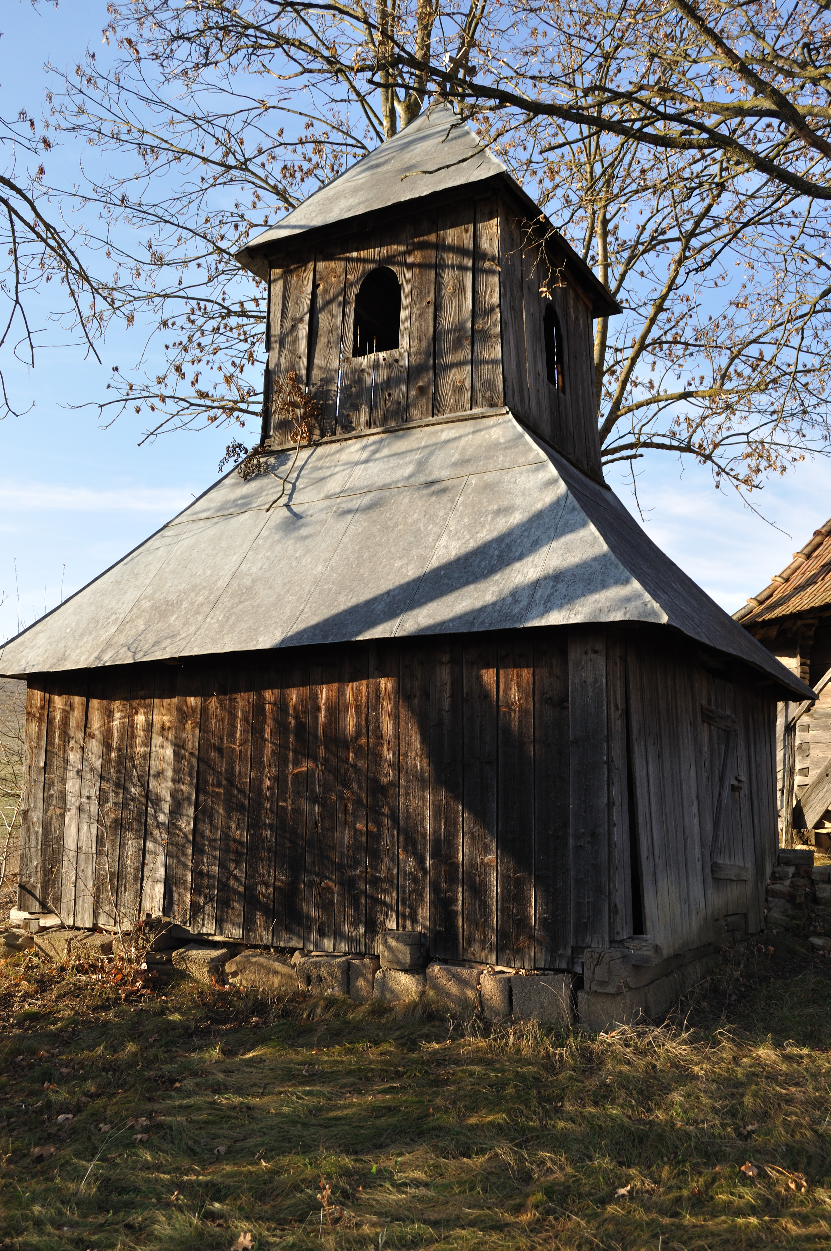 Biserica de lemn „Sfinții Arhangheli” din Fânațele Silivașului, județul Bistrița-Năsăud